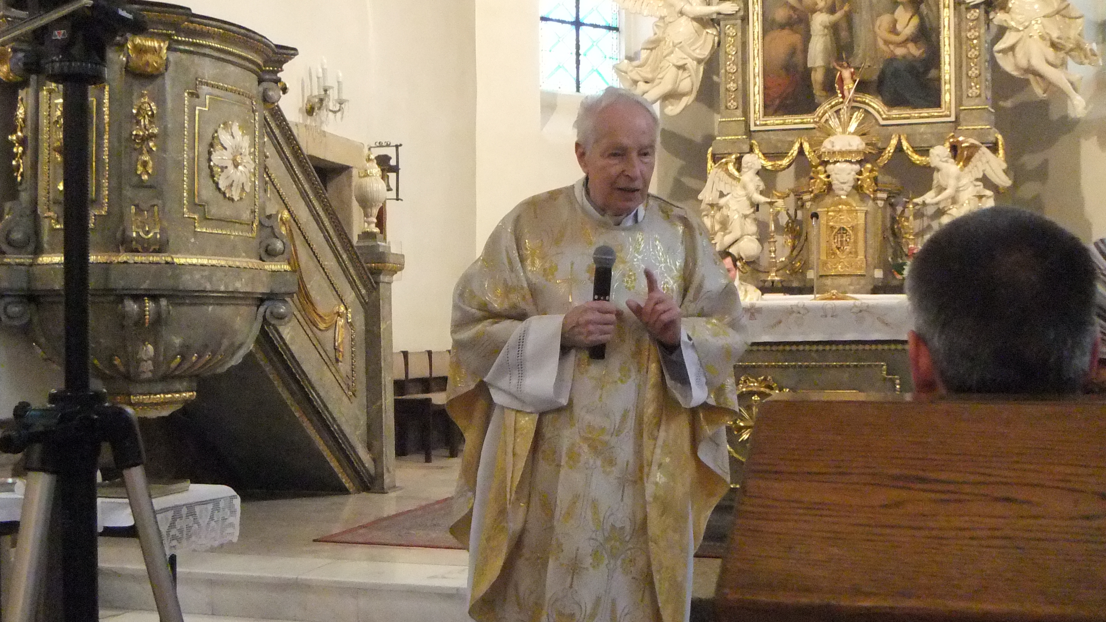 Pater Josef Mixa při křtu u sv. Gotharda v Praze Dejvicích